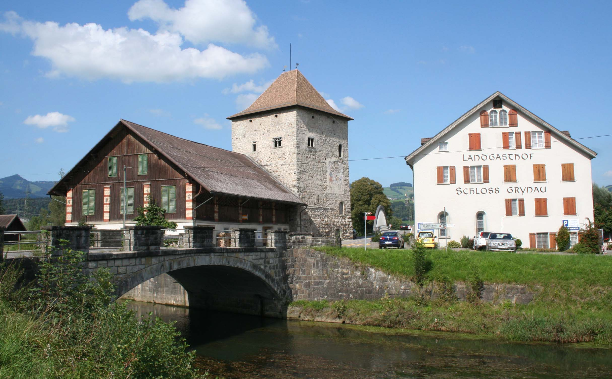 Grynau